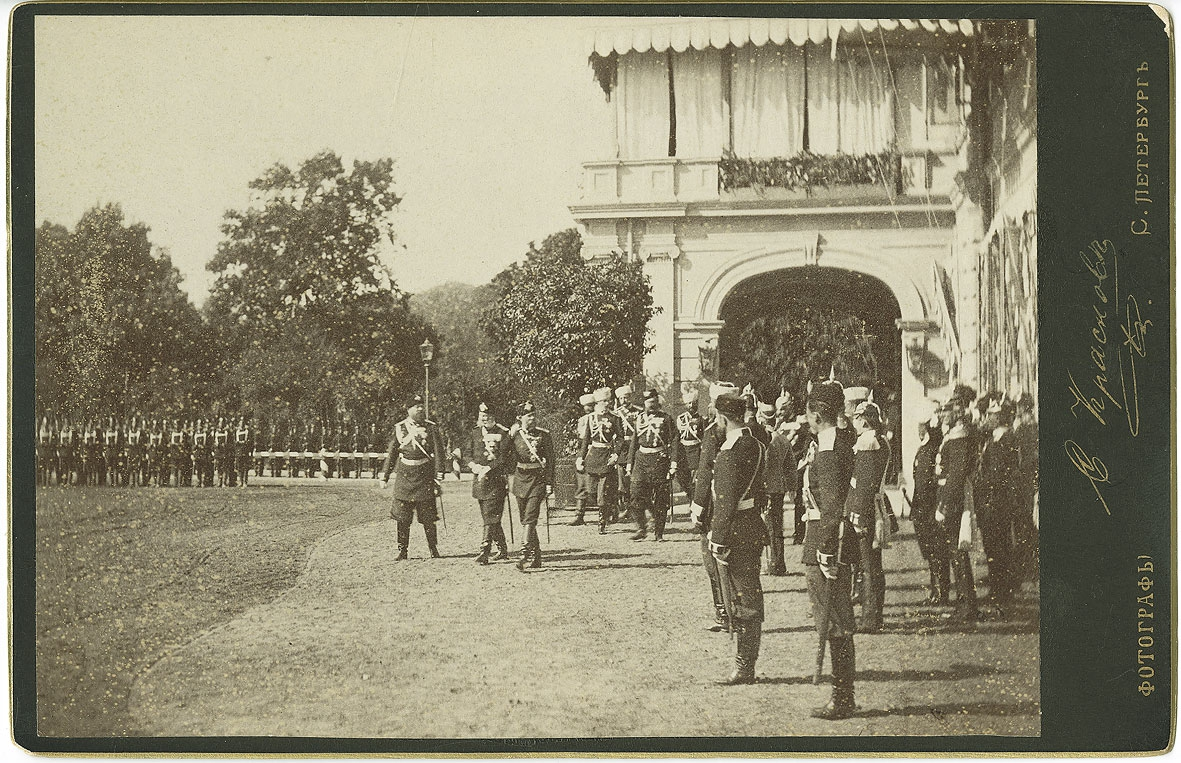 Zar Alexander III. von Russland, Kaiser Franz Joseph I. von Österreich und Kaiser Wilhelm I von Preußen beim Dreikaiser-Treffen in Skierniewiece